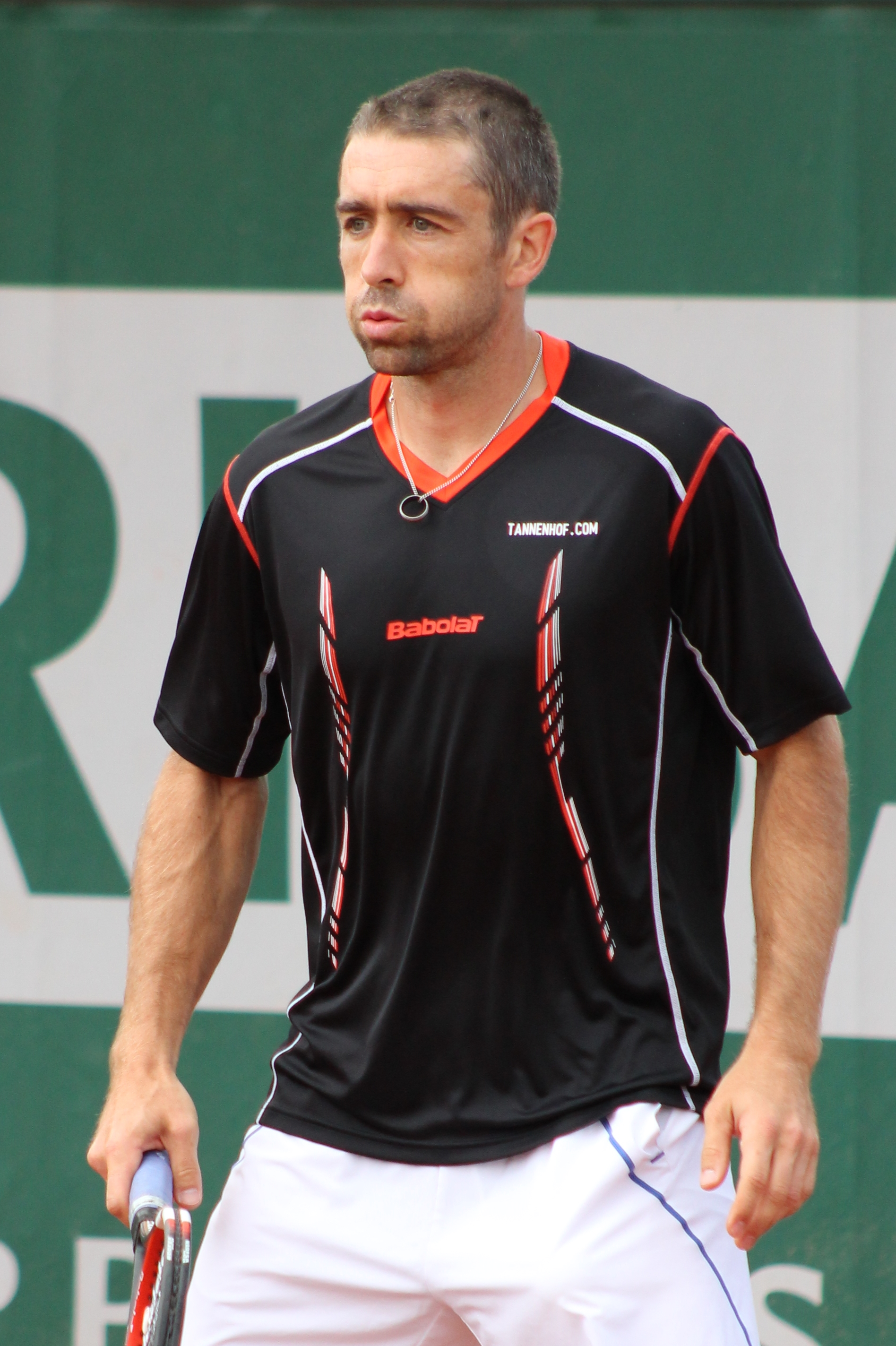 Becker RG15